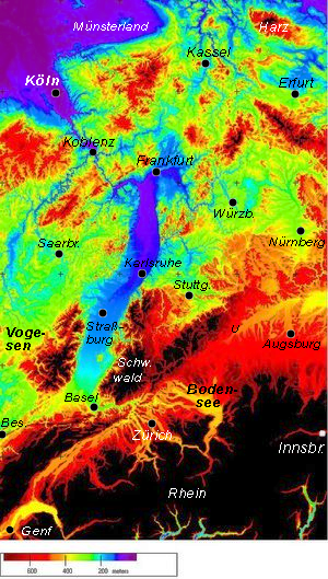 Beschreibung: Oberrheingraben (hypsograf.) mit Städten Quelle: Bild aus "Oberrheinische Tiefebene", hypsografisch nachbearbeitet und um die Lage von 18 Städten ergänzt + beschriftet Zeichner: Geof 18.1.2005 Andere Versionen: s.o. Lizenzstatus: GNU FDL 22:48, 18. Jan 2005 Geof 300 x 529 (354954 Byte) (Oberrheingraben (hypsograf.) mit Städten )